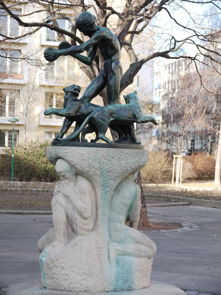 Scherzogruppe